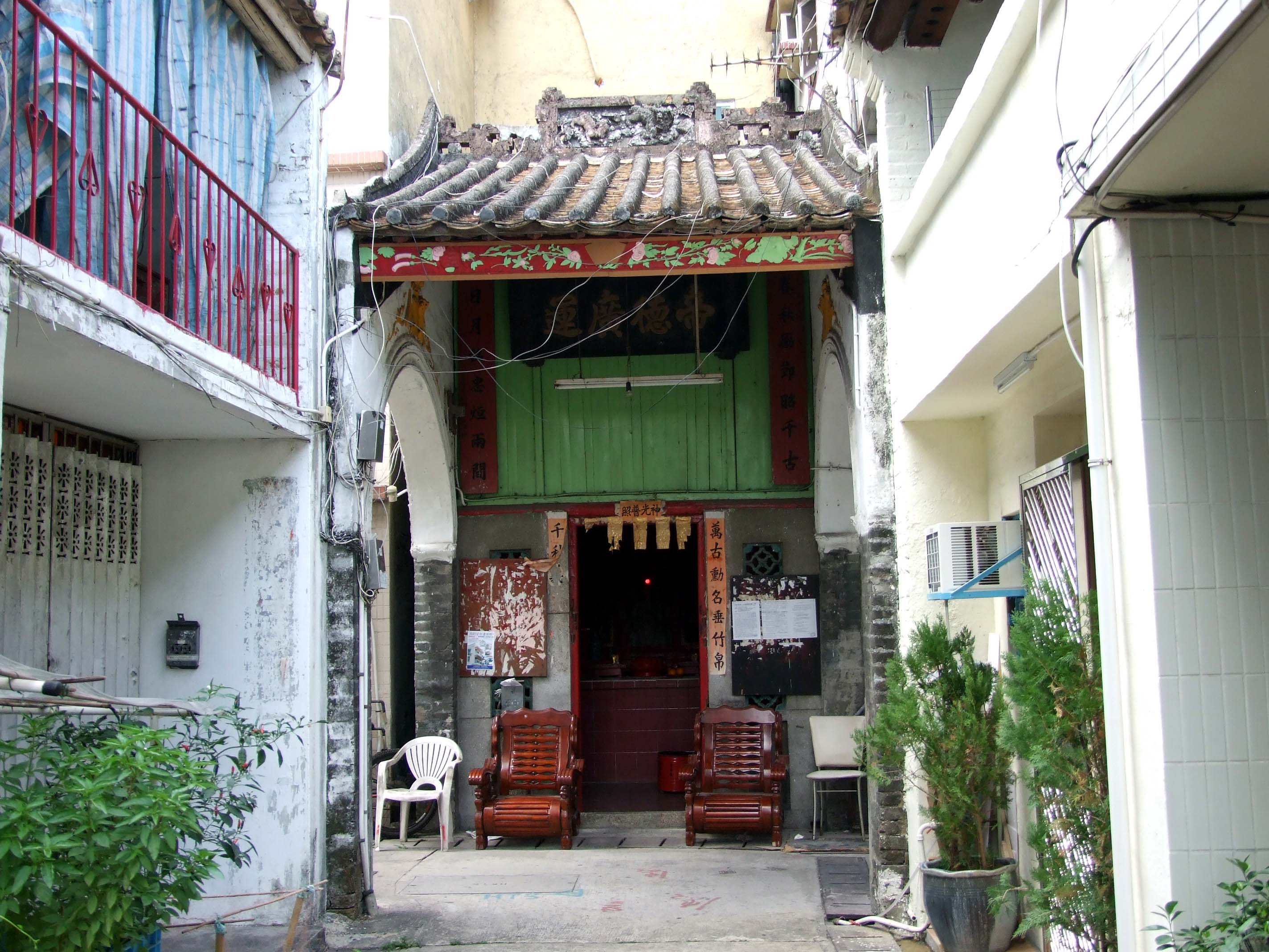 中文（香港）: 廈村廈村市關帝廟